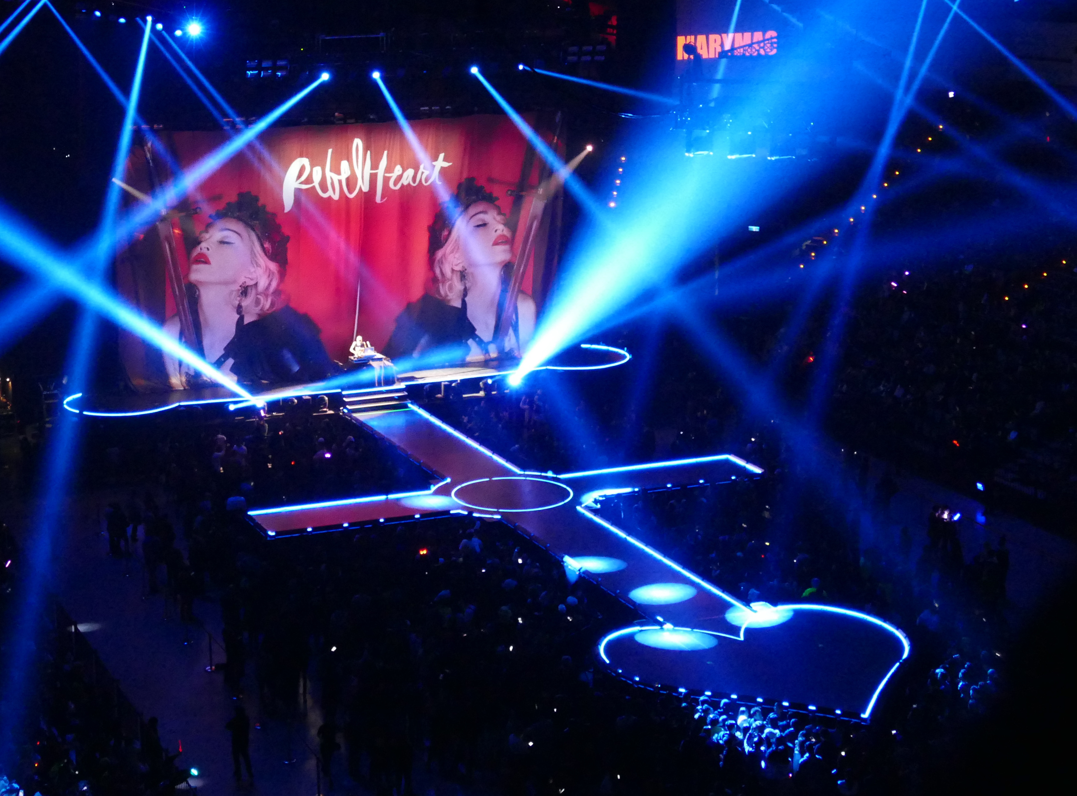 taipei_madonna_concert-4